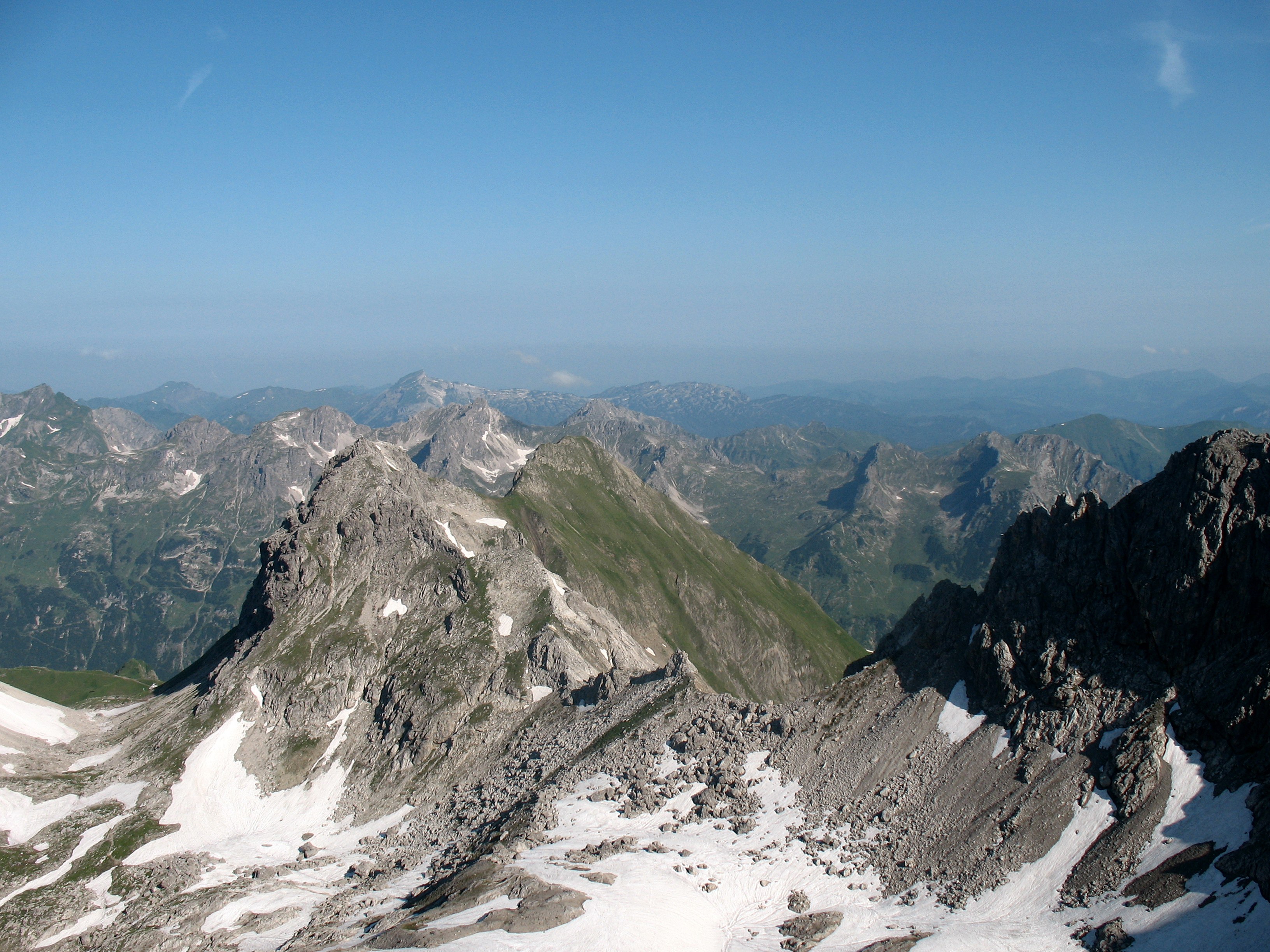 Blick aus dem Heilbronner Weg nach Westen über Rotgundspitze (2468 m) und den Linkerskopf (2459 m) auf die Schafalpenköpfe.